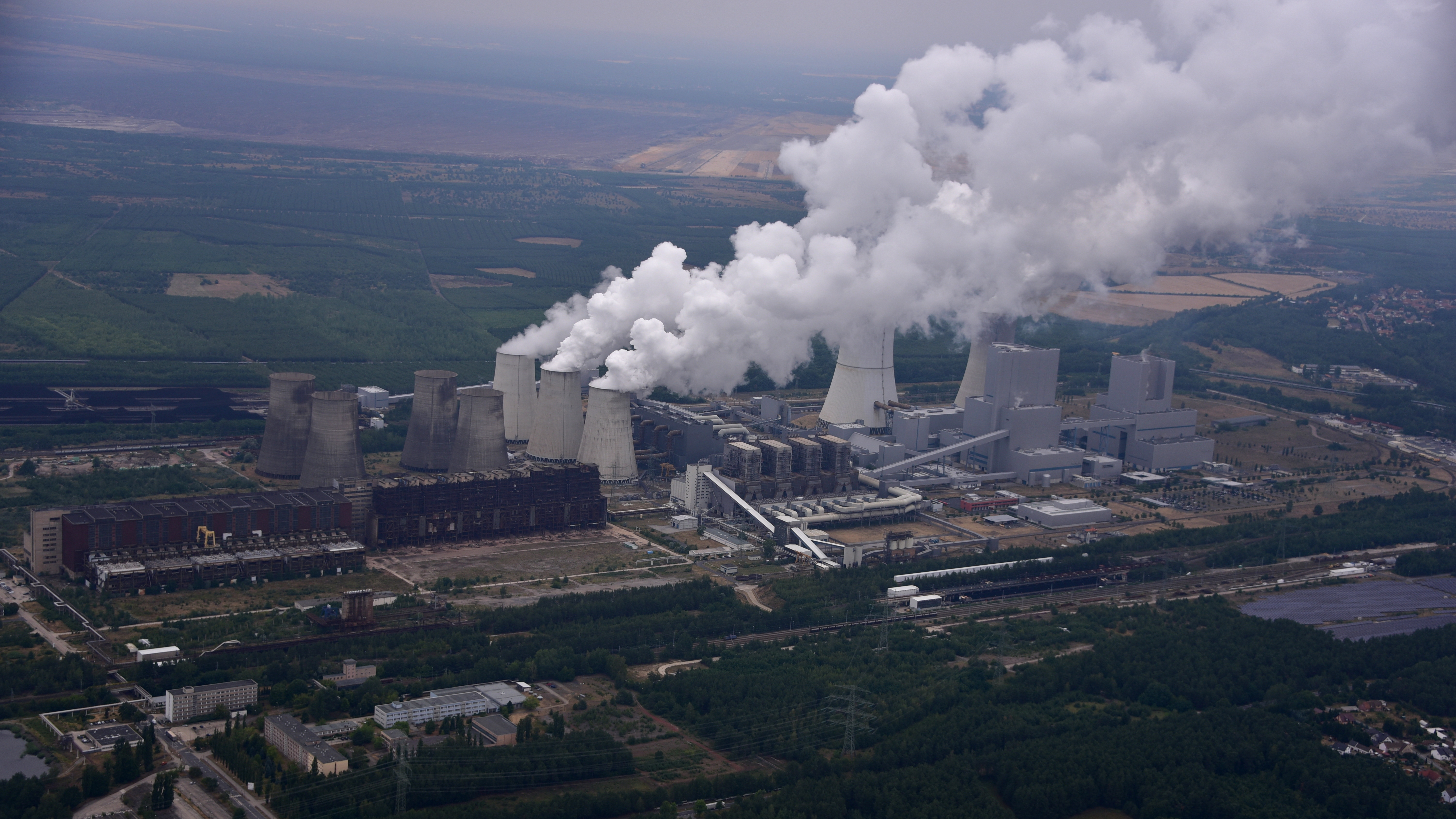 Kraftwerk Boxberg, Luftaufnahme (2019) Hornjoserbsce: Powětrowy wobraz Hamorskeje milinarnje (2019)